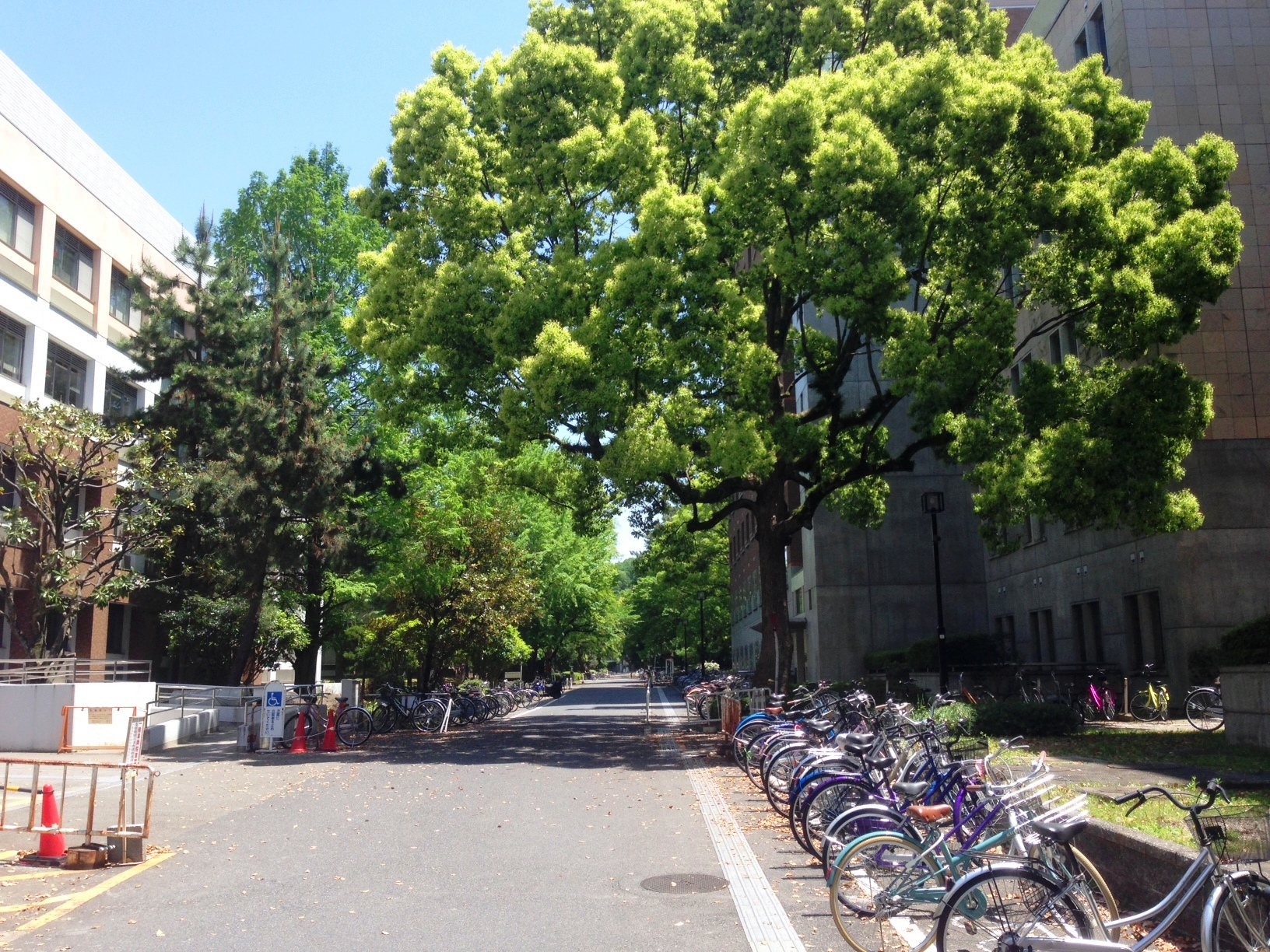 京都大学吉田キャンパス